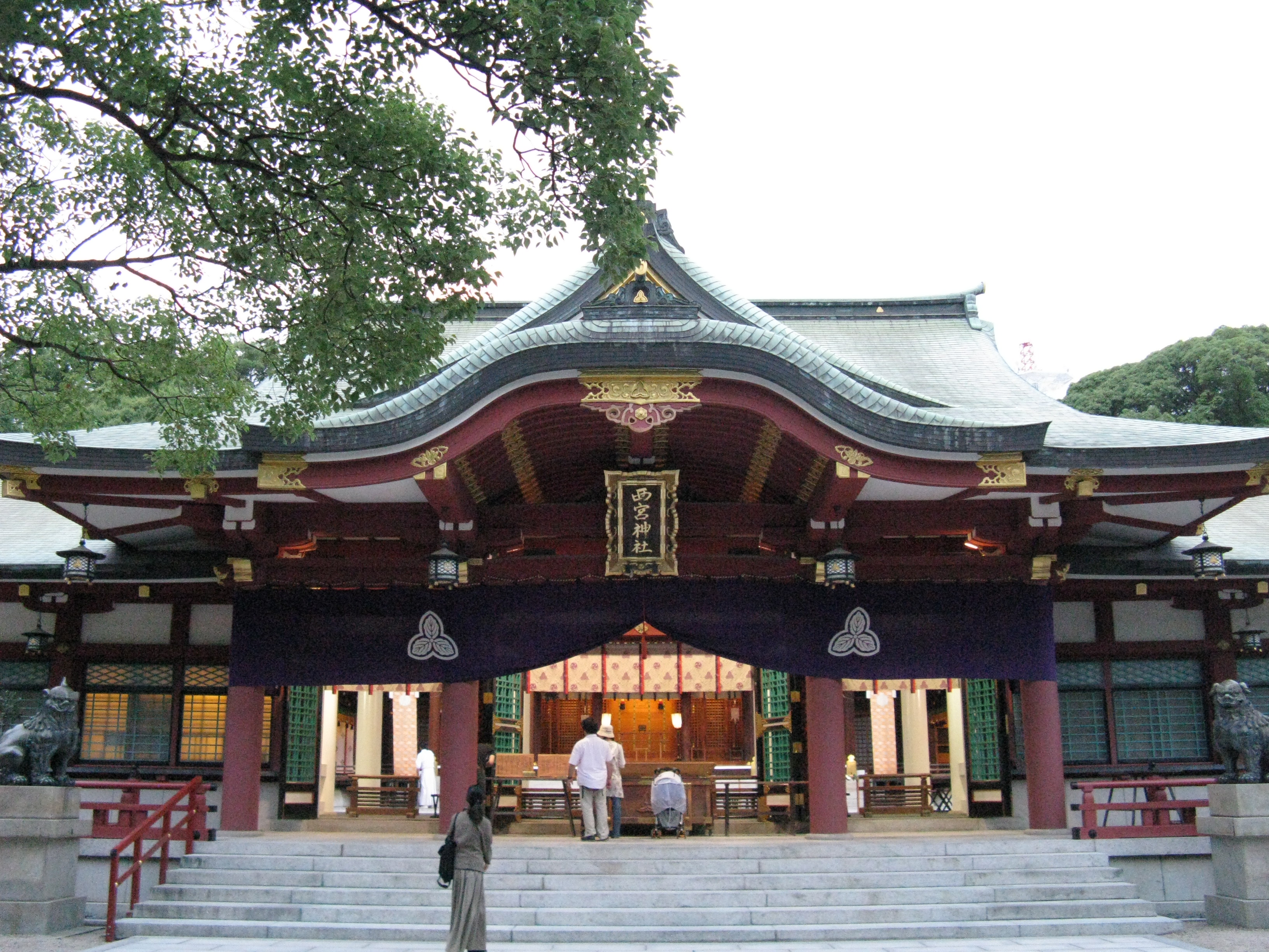 西宮神社 拝殿